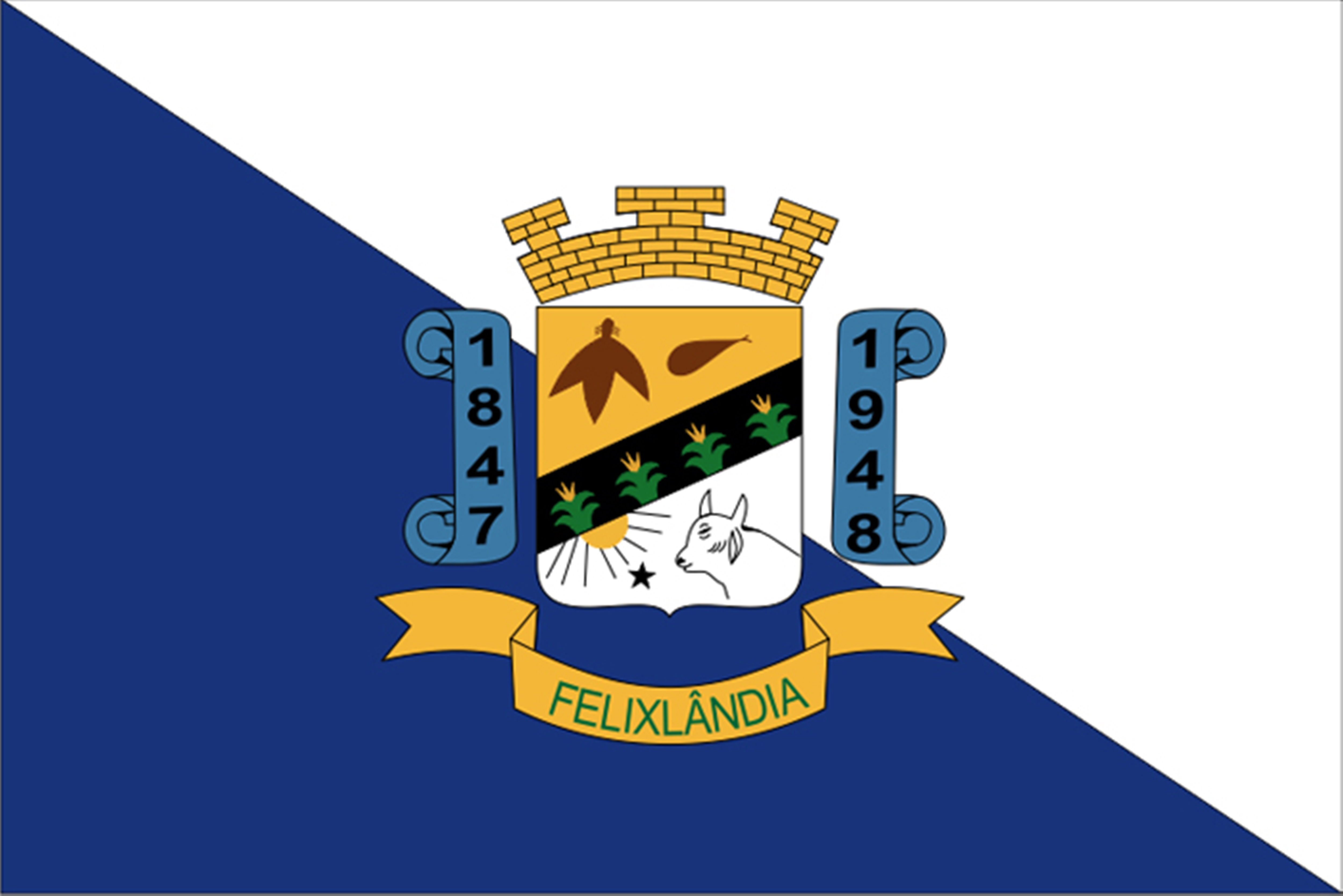 Bandeira Oficial do Município de Felixlândia MG